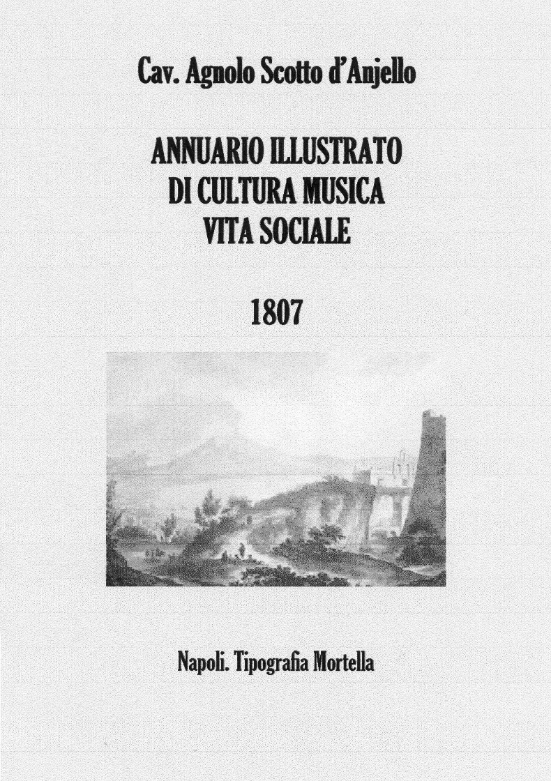 Annuario Illustrato di Cultura Musica Vita sociale 1807 del Cav. Agnolo Scotto d'Anjello. Napoli, Tipografia Mortella. Copertina